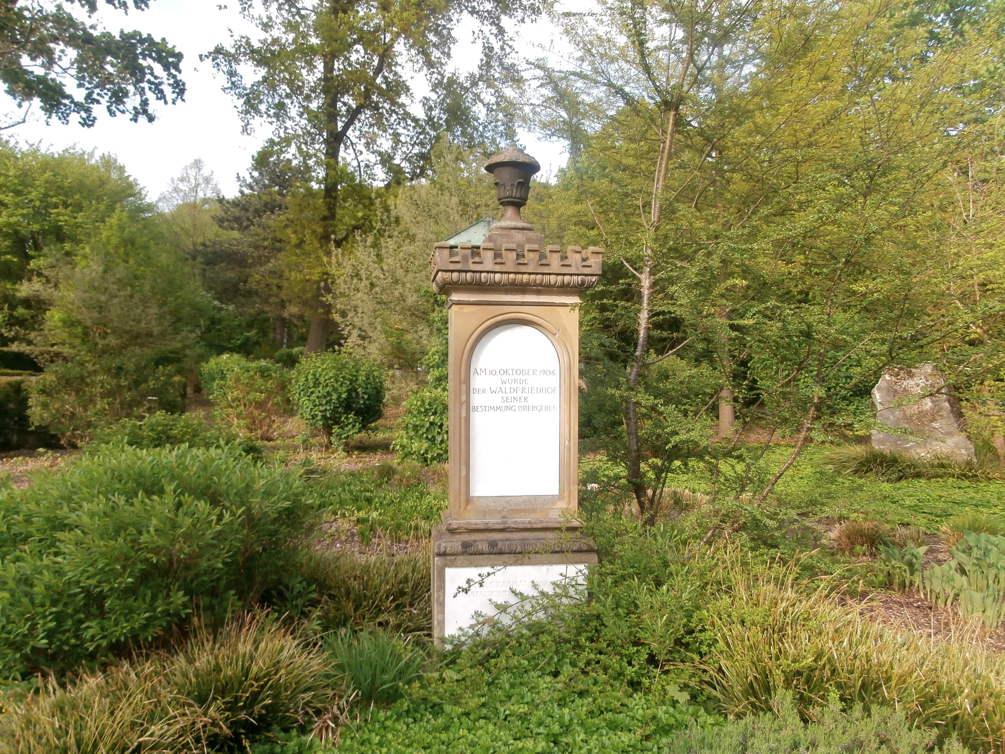 Eingangshinweis des Gerresheimer Waldfriedhofs (Ausschnitt)